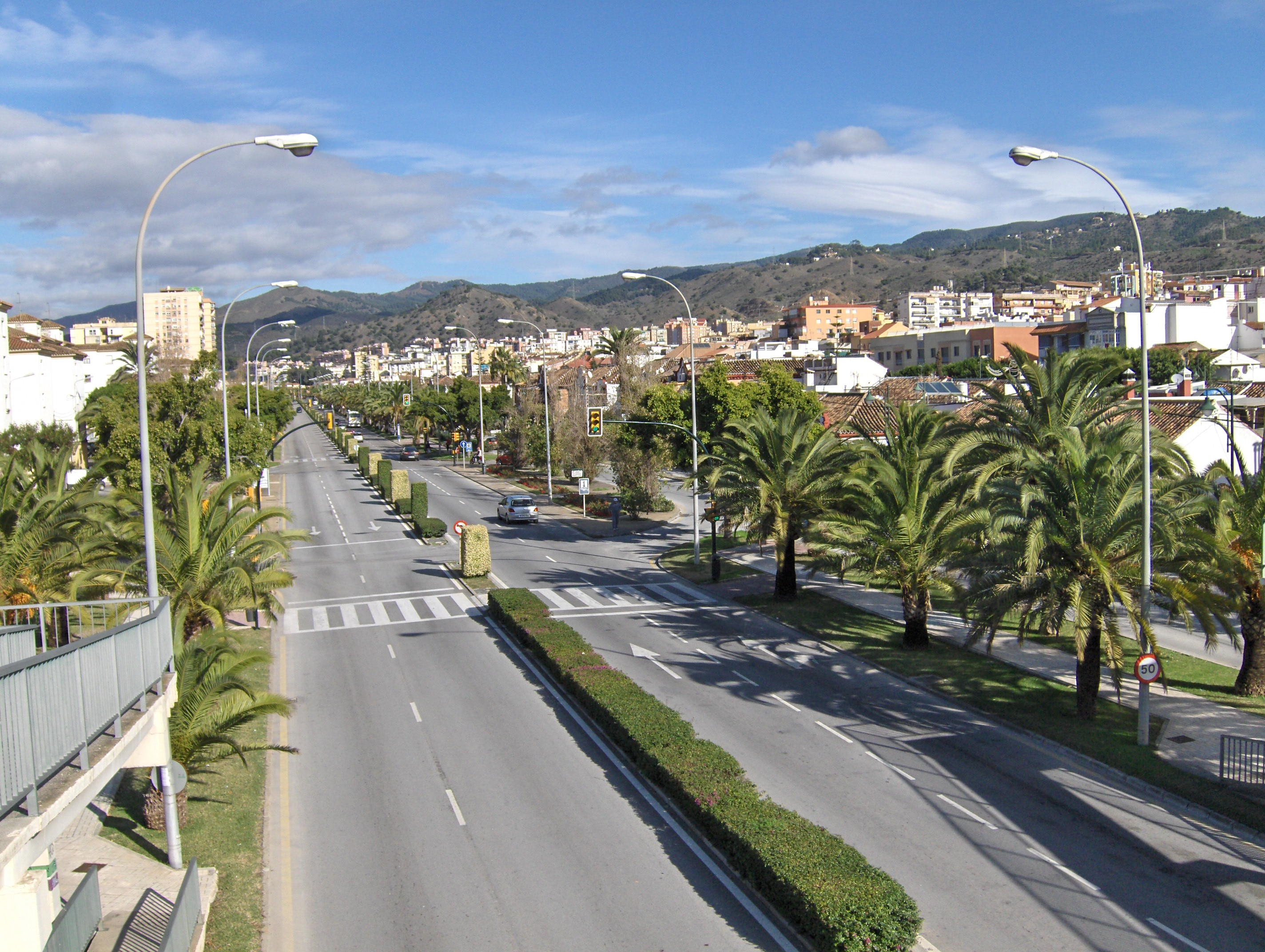 Avenida de Santiago Ramón y Cajal, Málaga, España.